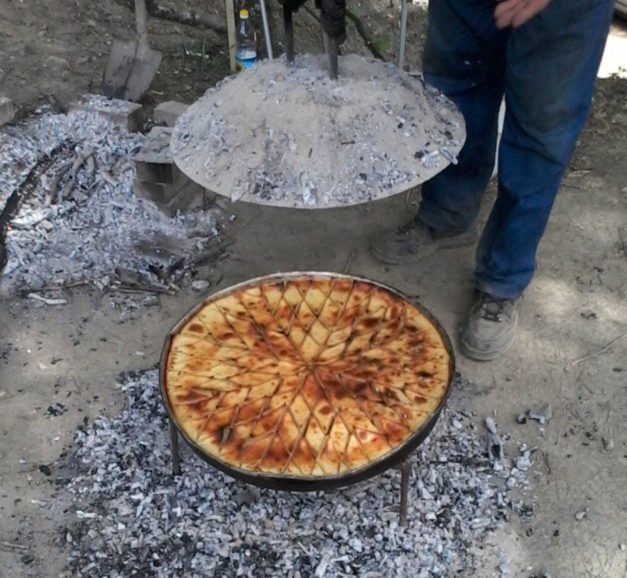 Подготовка на еден македонски специјалитет-ѓомлезе.